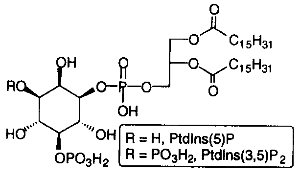 Structures du phosphatidylinositol-5-phosphate et du phosphatidylinositol-3,5-diphosphate.